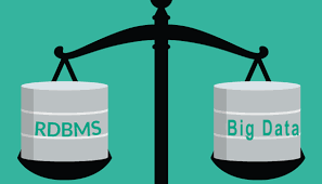 Монгол: Жишээ зураг